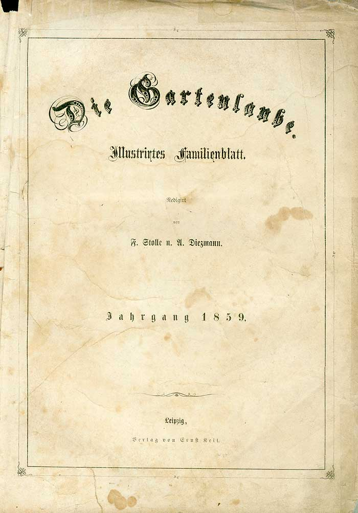 Dieses ist Titel-Seite, Vorwort-Seite p1 von 4, in dem Buch (title page p1 of 4 in journal) "Die Gartenlaube" 1859. Letzte Seite (end page): File:Die_Gartenlaube_(1859)_772.jpg - End of 1859 book.